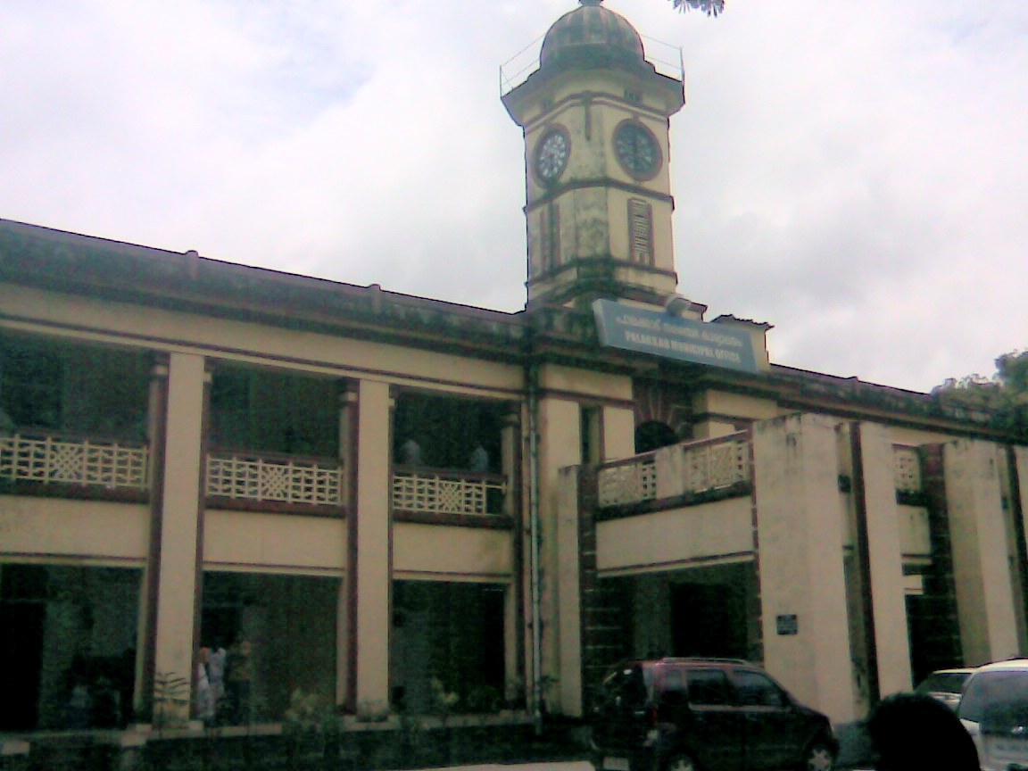 പാലക്കാട് നഗരസഭാ കാര്യാലയം